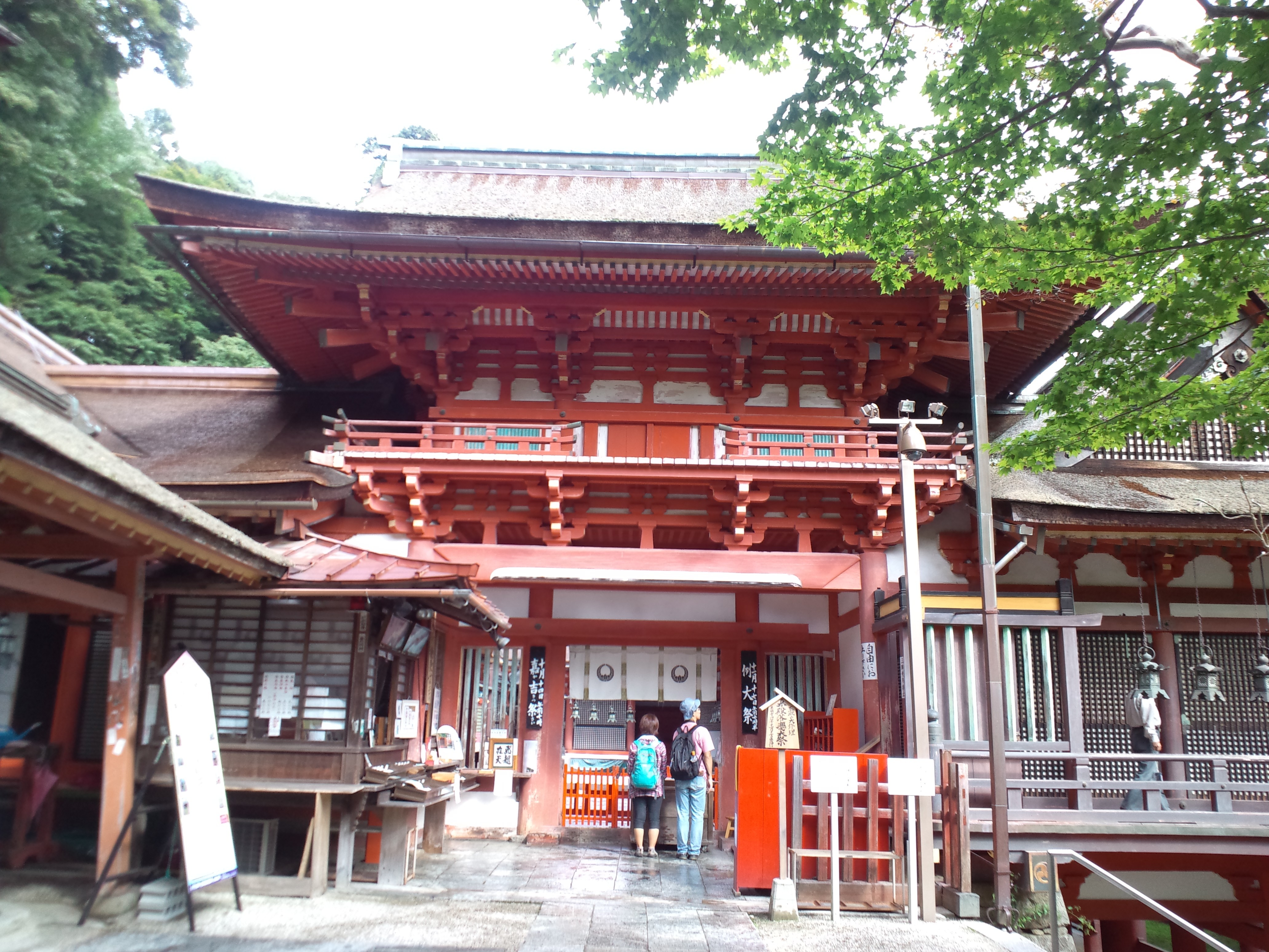 談山神社 楼門